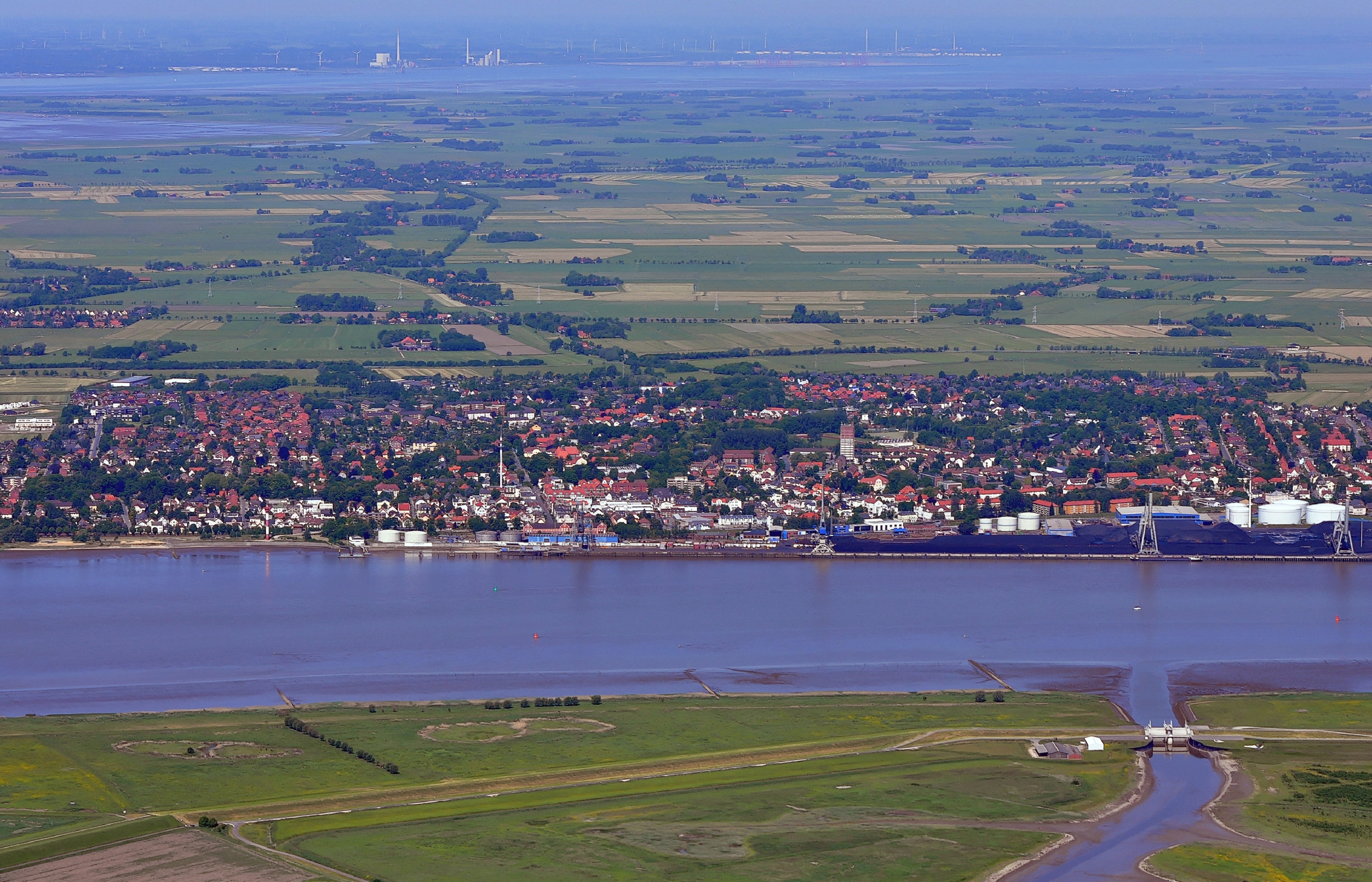 Luftbild: Blick nach Nordwesten über die Alte Weser in der Luneplate (Vordergrund, seit 2015 Naturschutzgebiet) zum Sperrwerk Luneplate (vorne rechts), Bremerhaven; dahinter die Weser und Nordenham, im Hintergrund Butjadingen